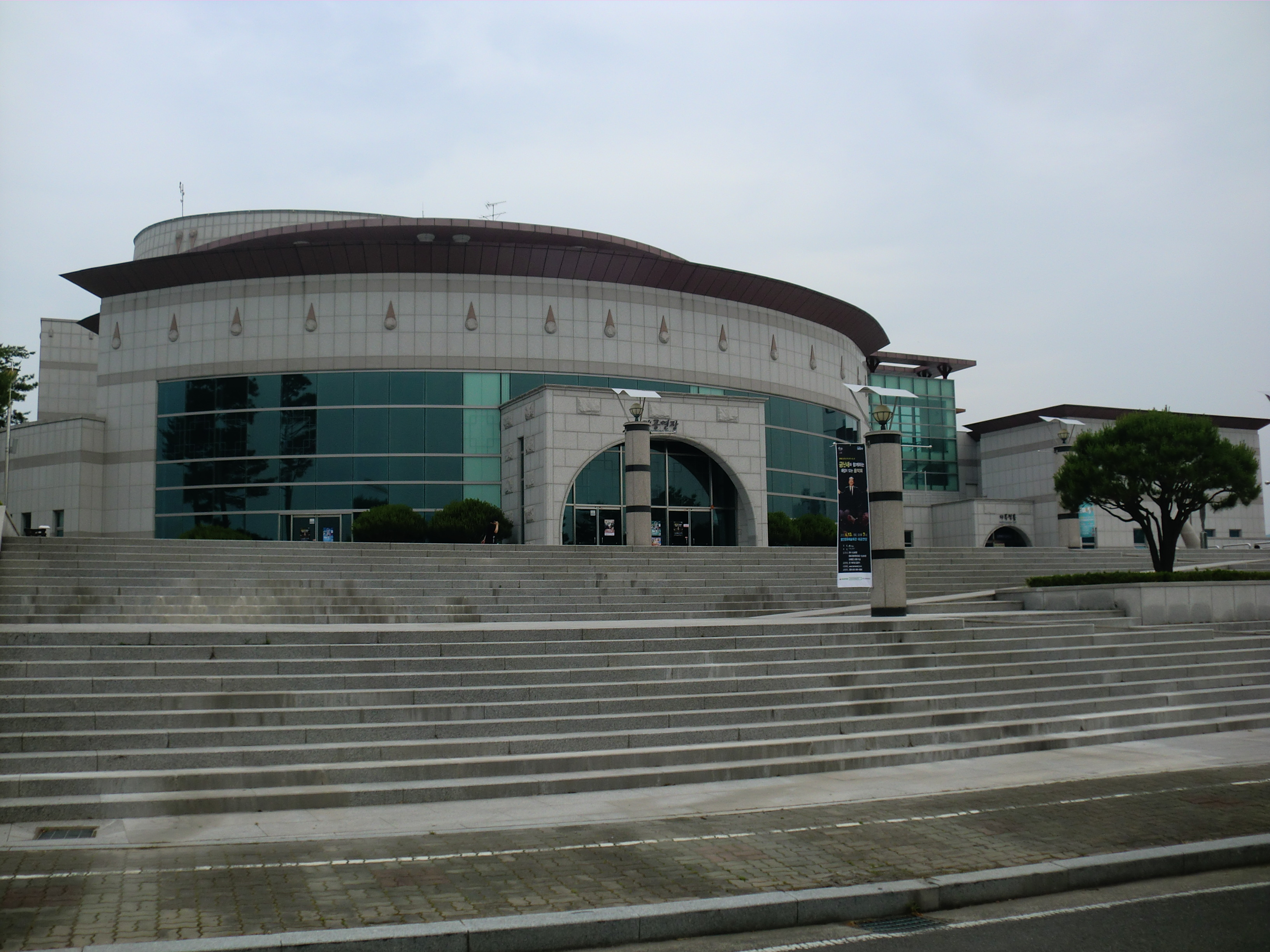 경상남도 함안군에 있는 함안문화예술회관